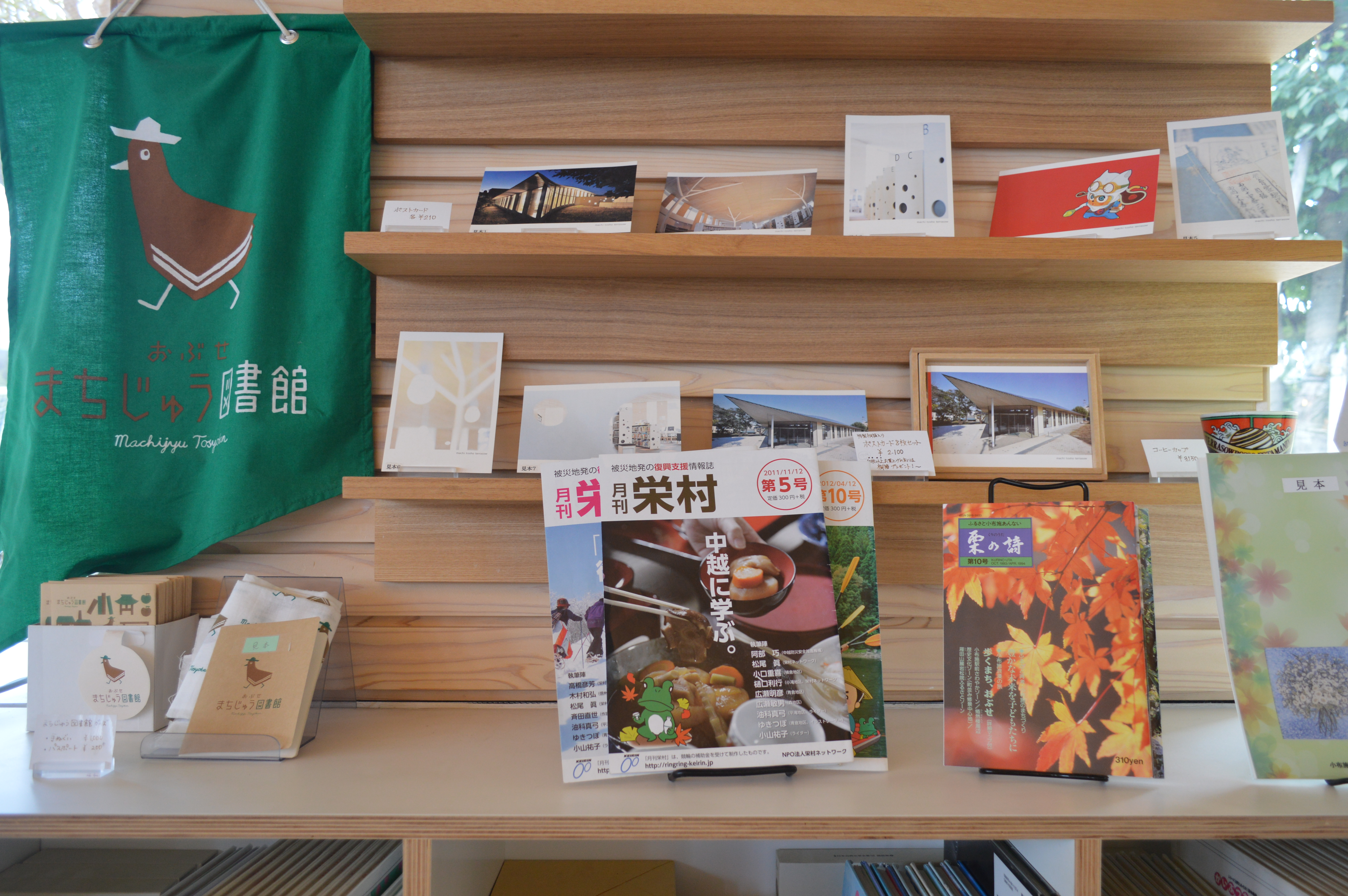 小布施町立図書館まちとしょテラソ。